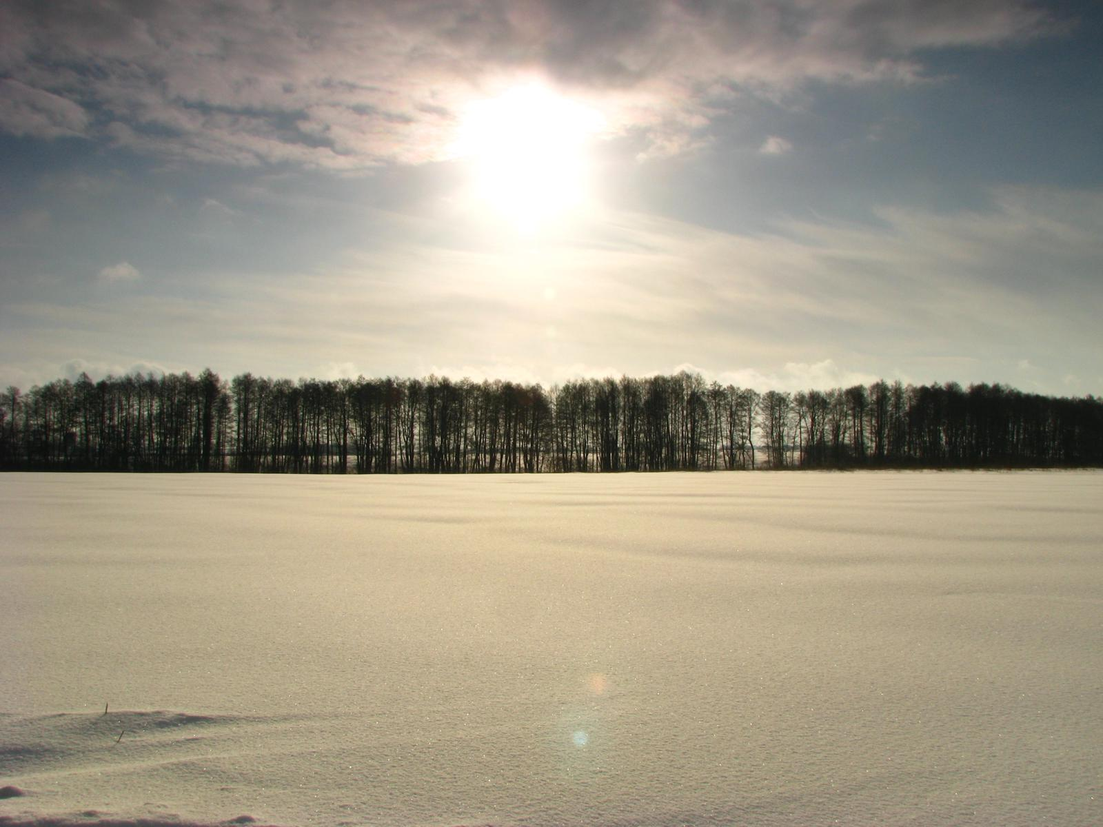 Okolice Wojcieszyc